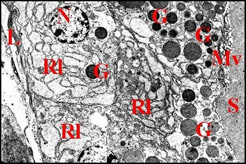 Autres cellules de glande prégonoporale d' Araneus sericatus avec leurs organites. Vue au microscope électronique à transmission.